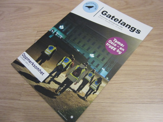 Magasinet Gatelangs (04-2011), som utgis av Natteravnene.